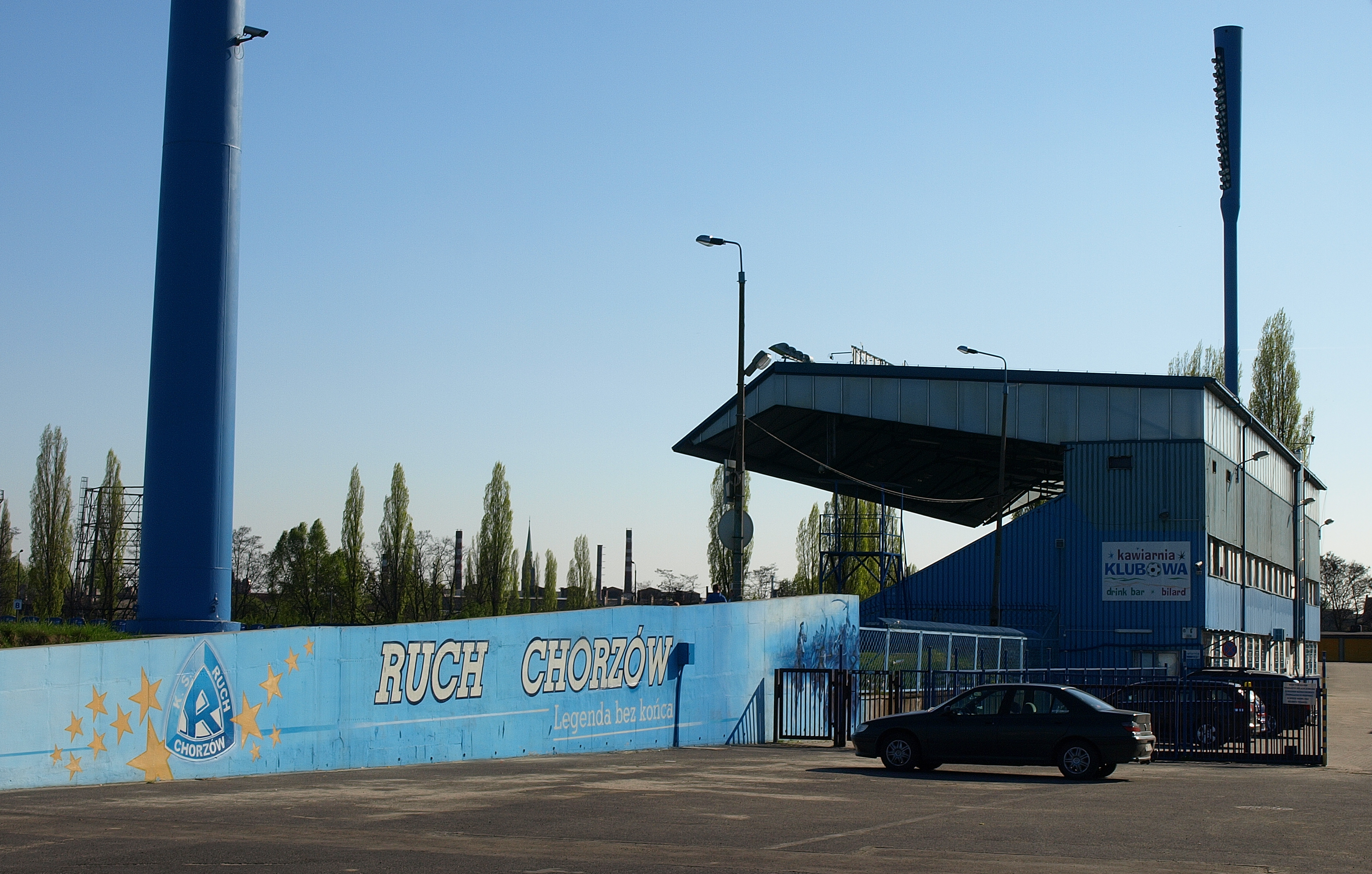 Graffiti na stadionie Ruchu Chorzów